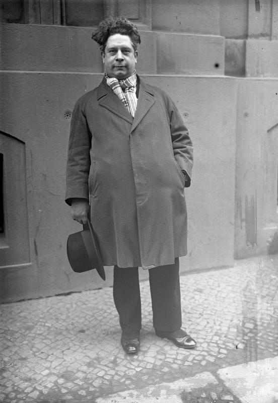 Der bekannte flämische Dichter Felix Timmersmanns liest im Berliner Herrenhaus aus eigenen Werken! Der durch die Werke "Jesus in Flandern" und "Pallieter" in Deutschland berühmt gewordene flämische Dichter Felix Timmermanns.